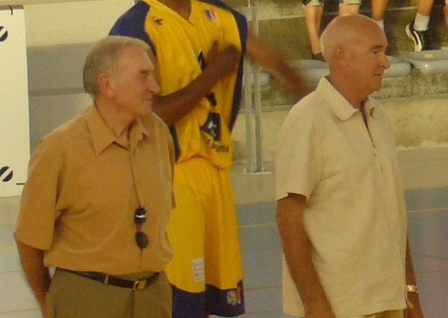 Les joueur français de basket-ball Jean et Pierre Galle (à Agde, 34)